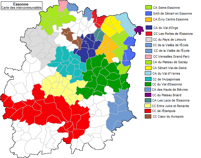 Carte des intercommunalités en Essonne en 2004.